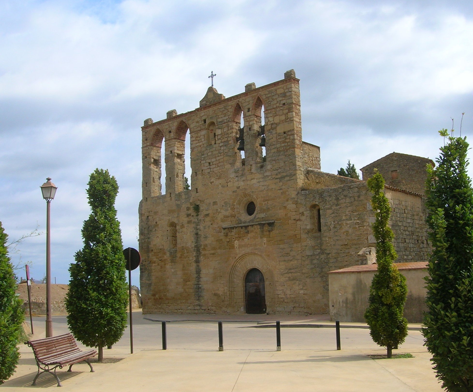 Església de Peratallada - Baix Empordà - Catalunya